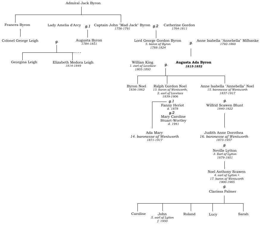 Augusta Ada stamtræ